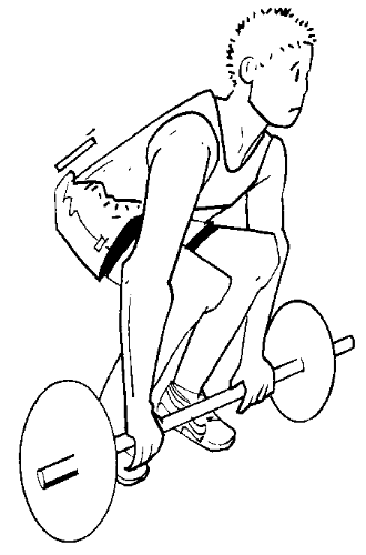 Musculation exercice arraché 1.png